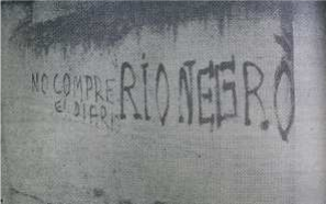 Pintada contra el diario Río Negro, en la localidad de Cipolletti, en septiembre de 1969, acusando al periódico de apoyar los intereses de la localidad de General Roca en el marco del conflicto que tenía lugar en la provincia.